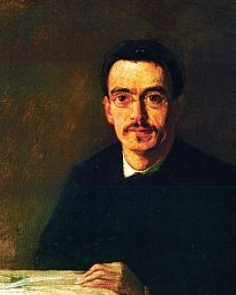 Portrait des Philosophen und Schriftstellers Rudolf Steiner aus dem Jahre 1892